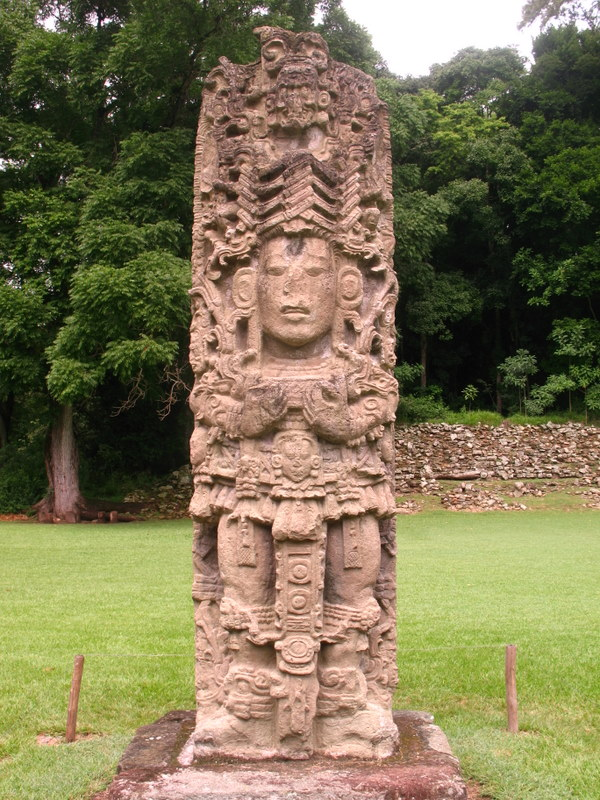 Copan Copán, Honduras